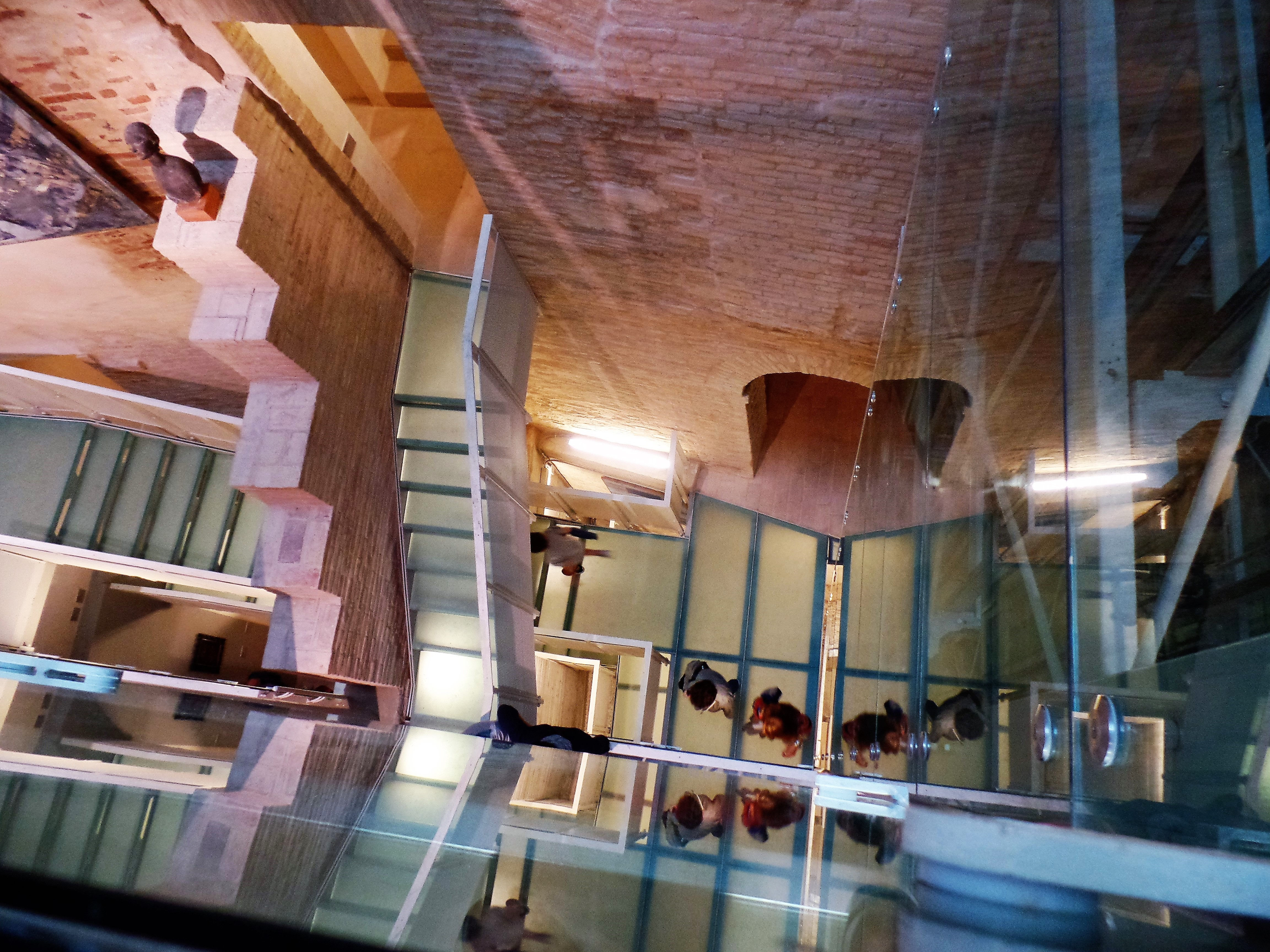 Pinacoteca Podesti AN nuova scala interna